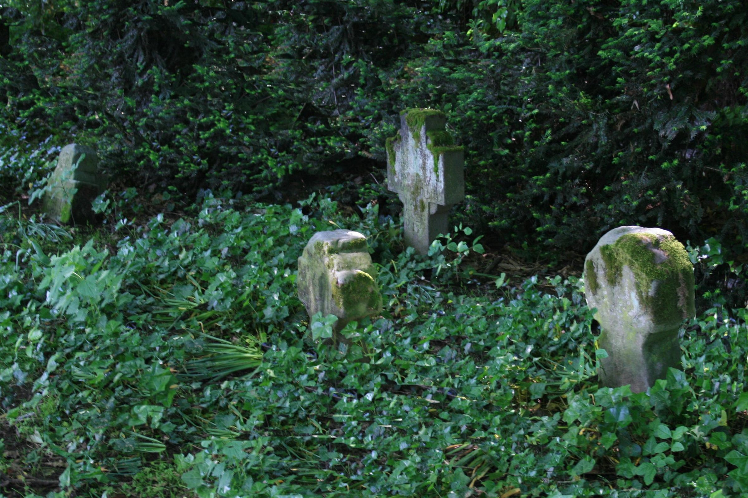 Grabkreuze Engelblecker Straße Mönchengladbach / Katholischer Friedhof in Neuwerk